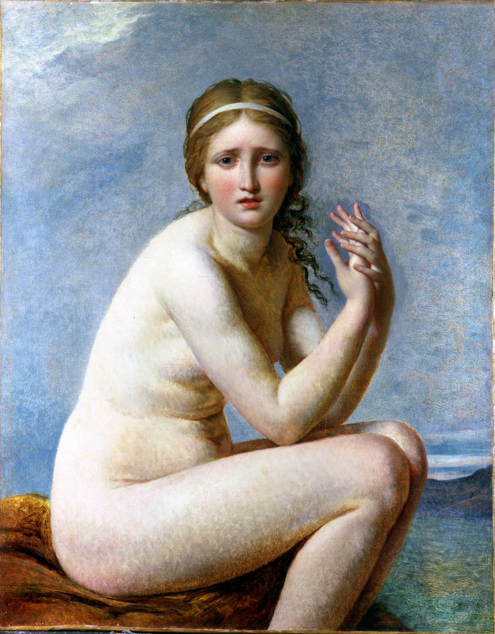 Psyché Abandonnée, de Jacques-louis David huile sur toile (1795), collection particulière